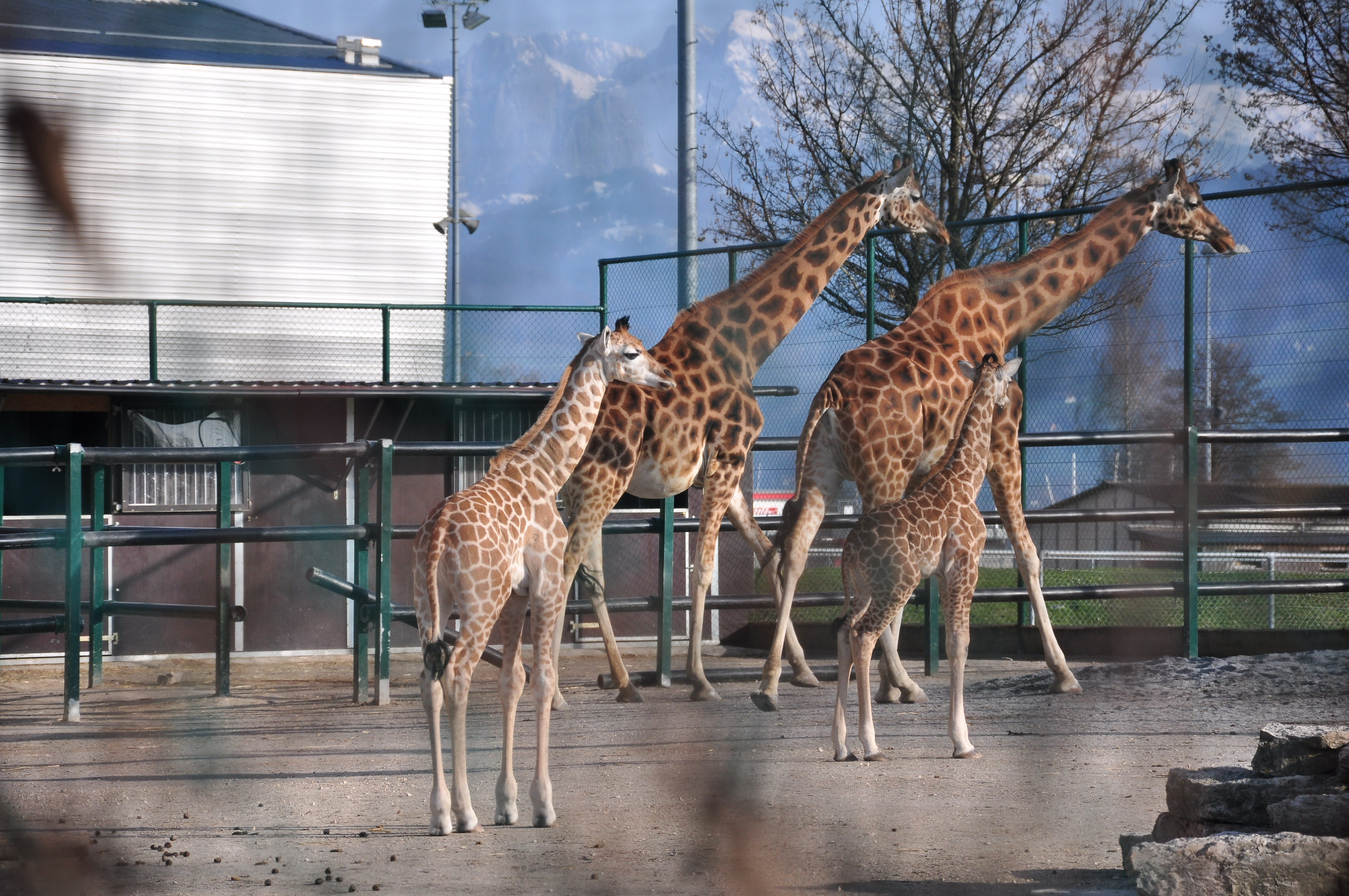 Giraffa camelopardalis, Knie's Kinderzoo in Rapperswil (Switzerland)13. März 2011 15:30 Uhr: Mara (16 Jahre) gebar nach rund 16 Monaten Tragzeit ihr fünftes Jungtier (männlich).14. März 2011 13:30 Uhr: Luana (16 Jahre) gebar ihr fünftes Jungtier (weiblich).Der Kinderzirkus durfte damit die 15. Geburt einer vom Aussterben bedrohten Giraffen-Unterart feiern und auf diesem Weg einen wertvollen Beitrag zur Erhaltung der Rothschild-Giraffen leisten. Die Jungtiere werden Namen mit den Anfangsbuchstaben ‹J› erhalten.